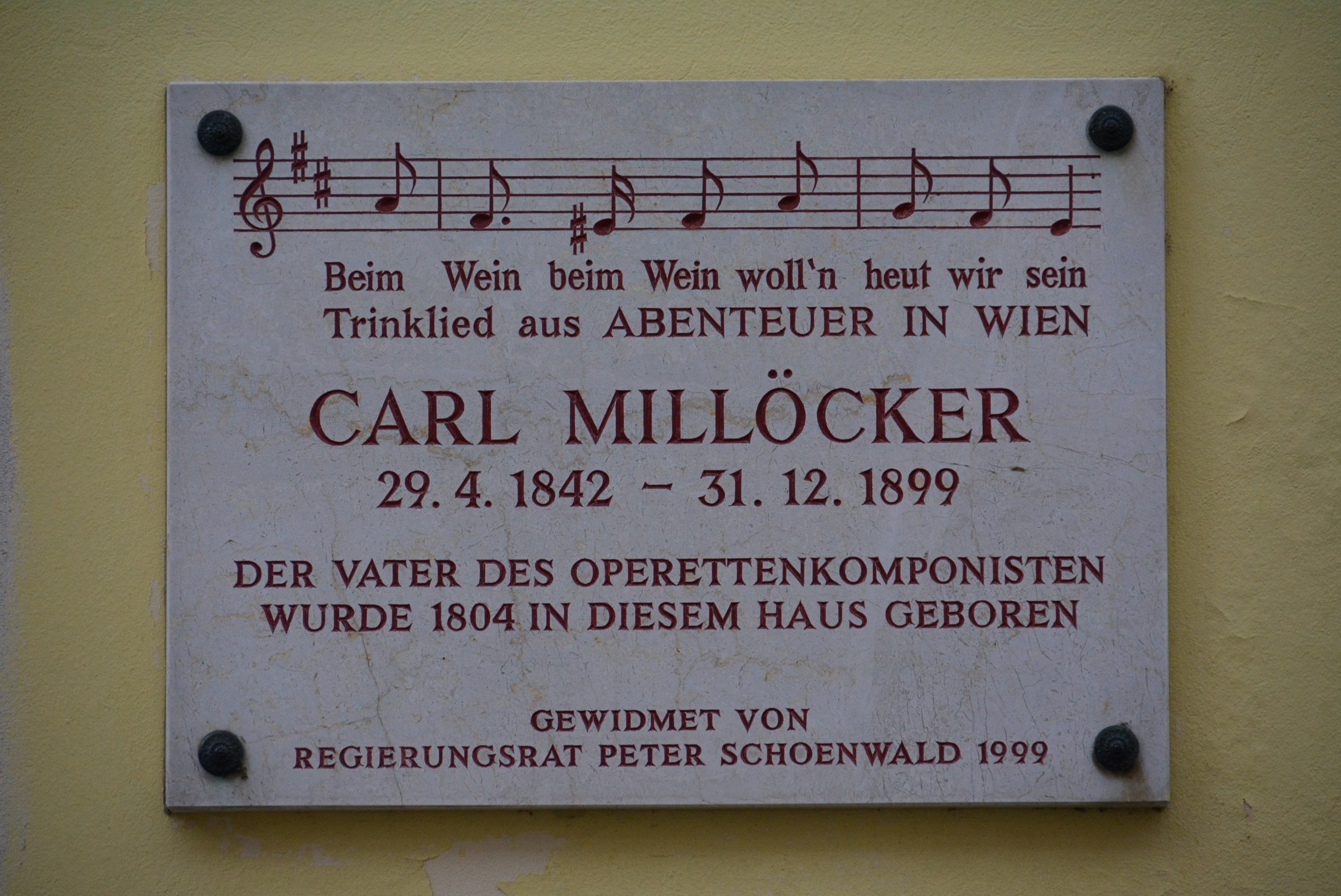 Gedenktafel für Karl Millöcker (Wien, Hackhofergasse 8)